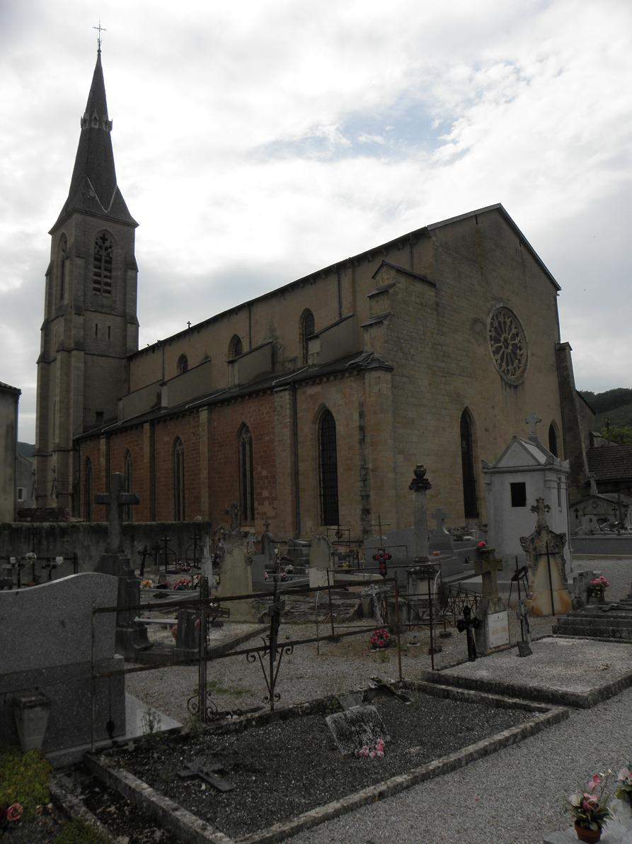 Chevet et flanc sud de la cathédrale Saint-Sauveur de Vabres-l'Abbaye (12).